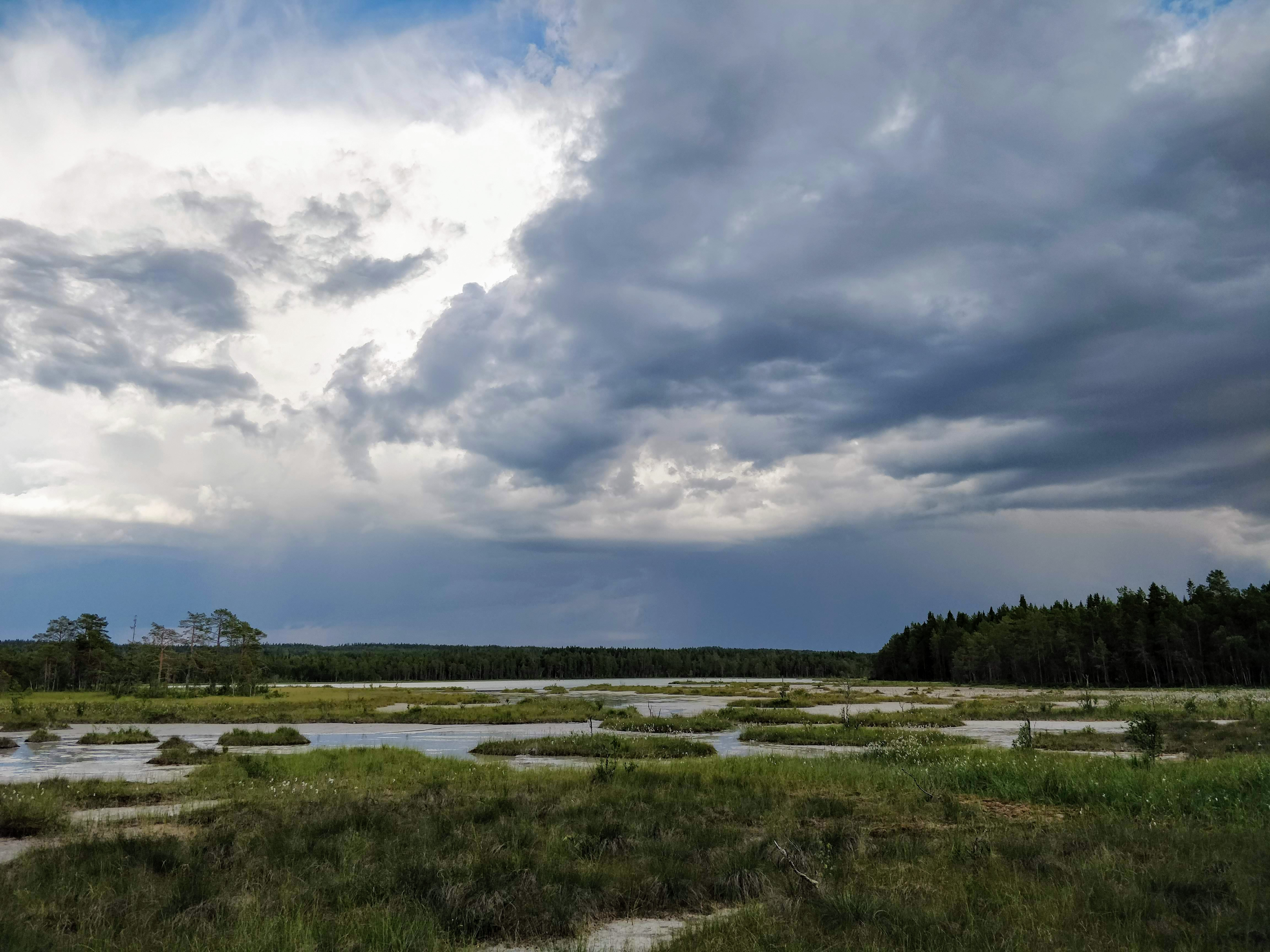 Kanten av Svedjesjön